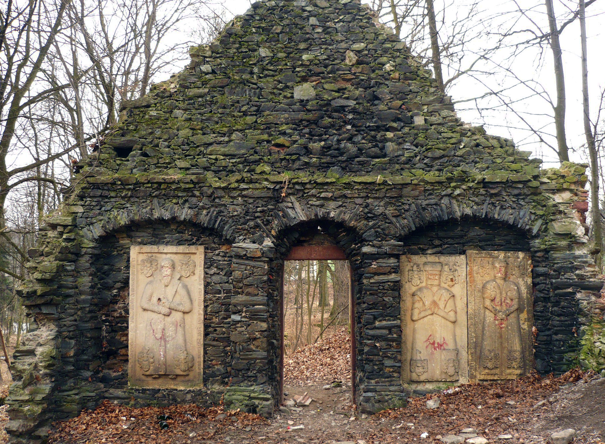 Sztuczna ruina w parku, Bożków